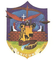 Brasão de Anicuns, Goiás, Brasil.